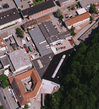 Firmengebäude der Firma Zenner in Saarbrücken